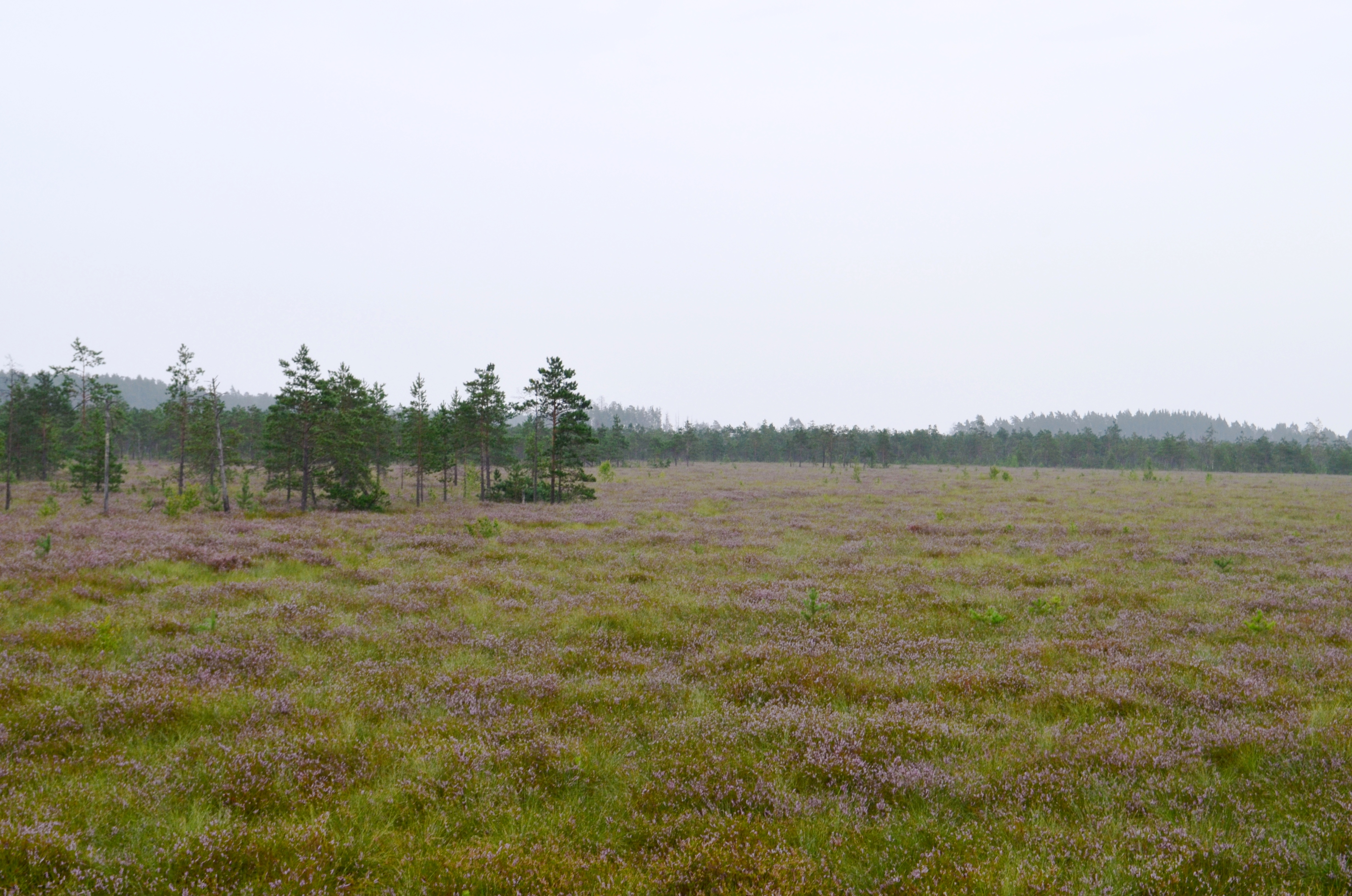 Čepkelių kimininė aukštapelkė, apaugusi viržiais, Varėnos r.